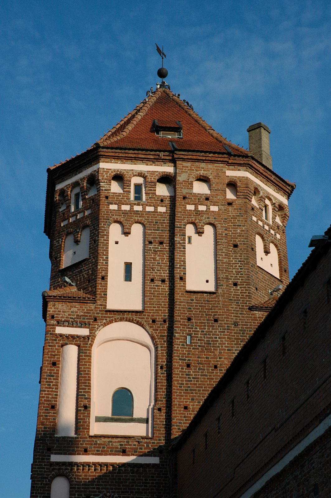 Мирский замок